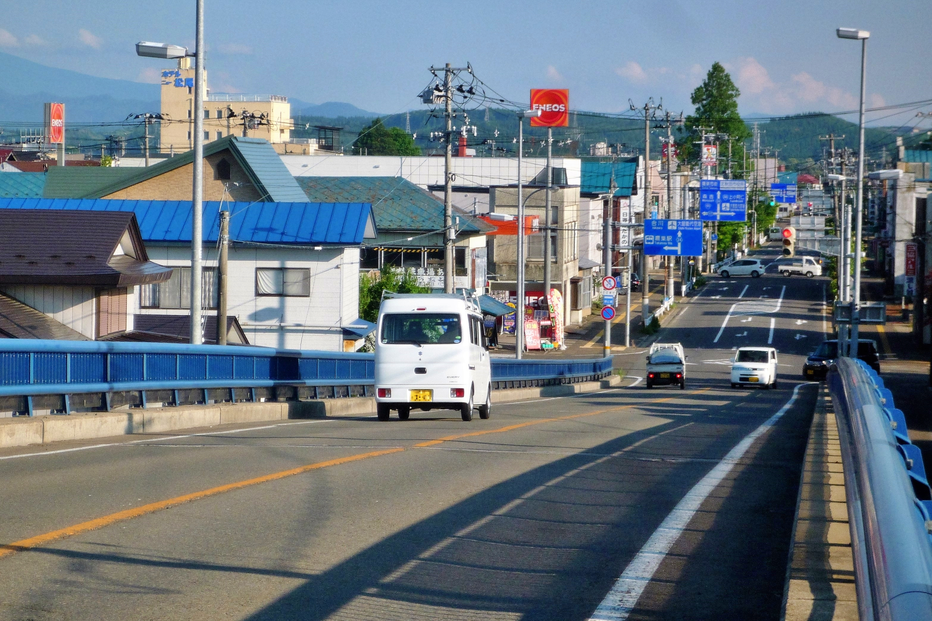 秋田県道24号鷹巣川井堂川線 鷹巣市街